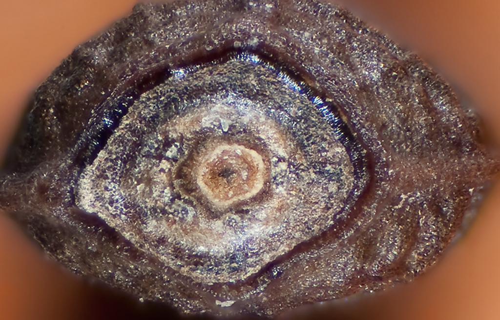 Onopordum acanthium - (Cardo borriquero, Toba) - Cipsela suelta desprovista de su vilano con placa apical cuadrangular/subpentangular y nectario pentalobulado.